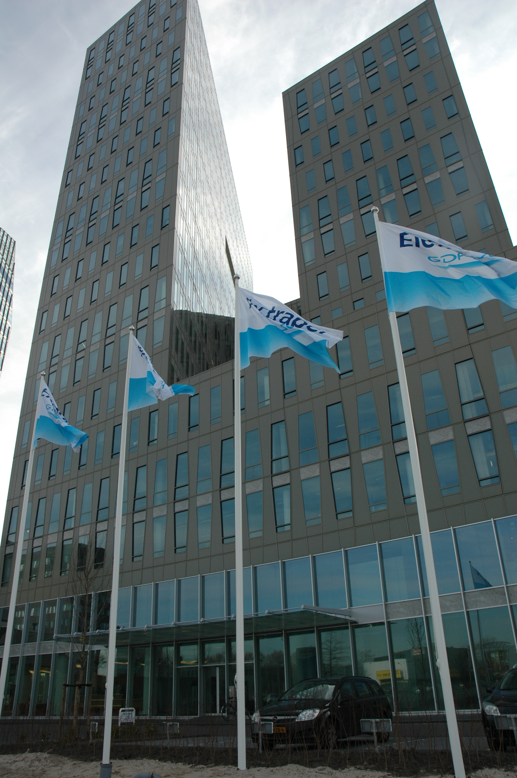 Hoofdkantoor Electrabel Nederland